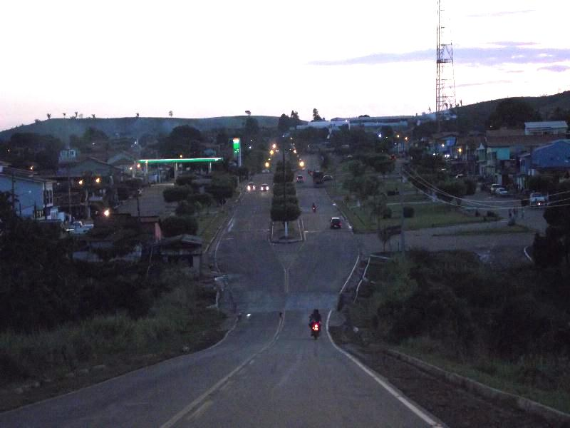 Abel Figueredo, estado do Pará, Brasil.